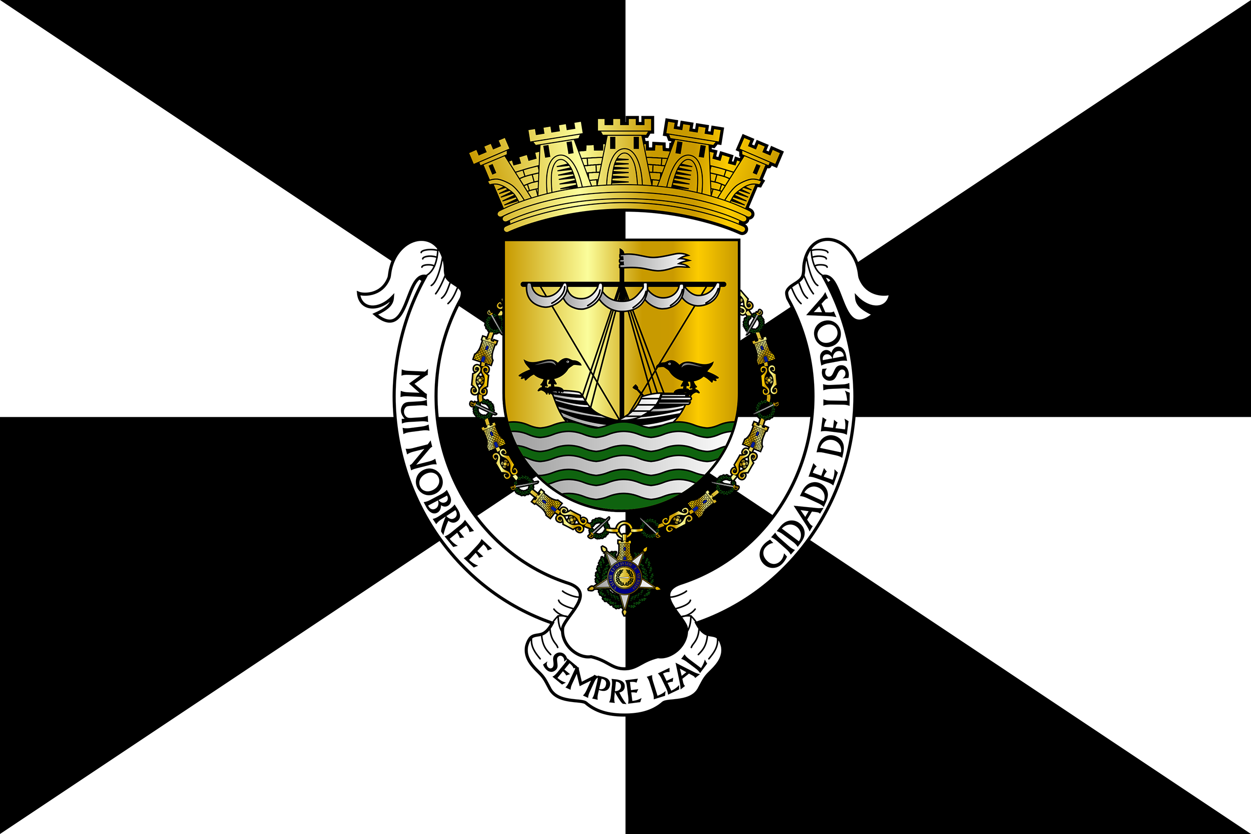 Lisbon's flag